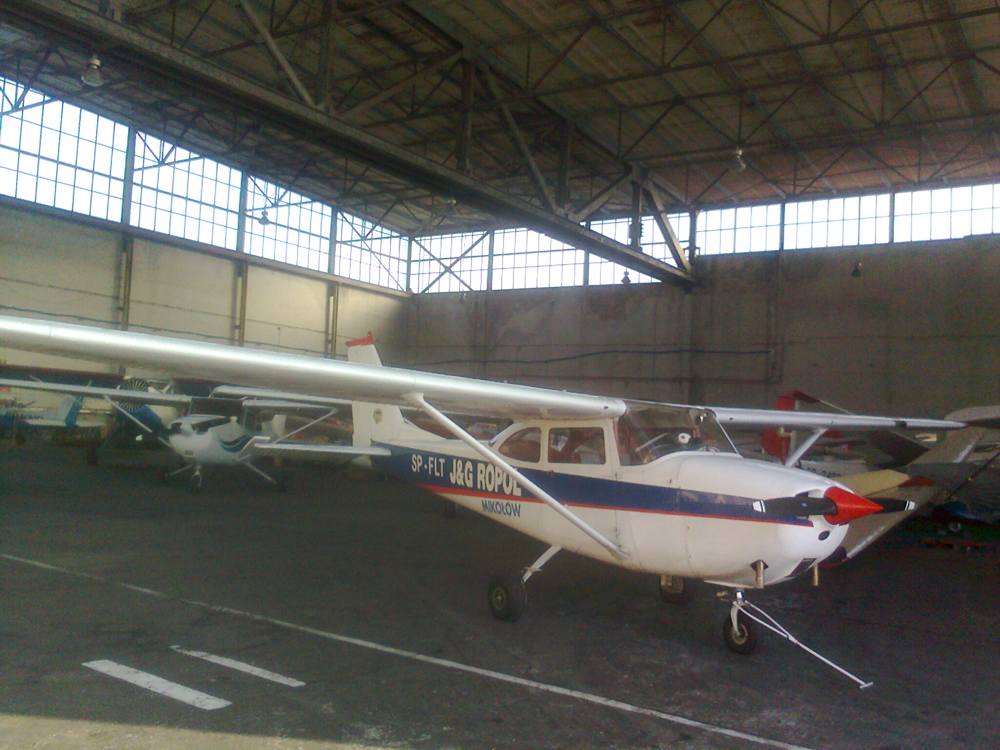 Cessna 172 Skyhawk H SP-FLT w hangarze